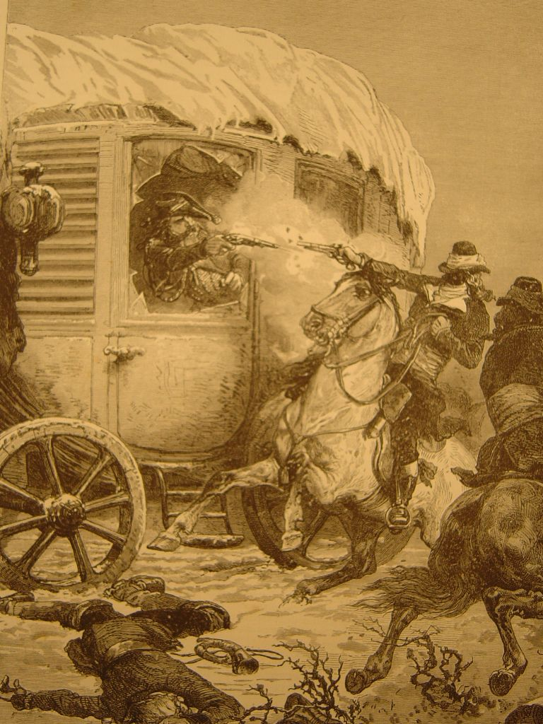 l'attaque de la diligence par de Neuville